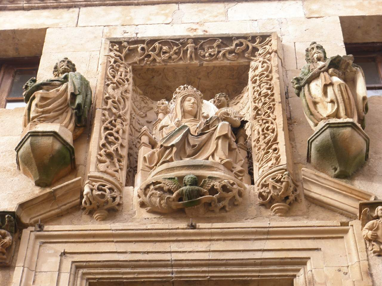 Salamanca - Colegio de Santa María de los Ángeles